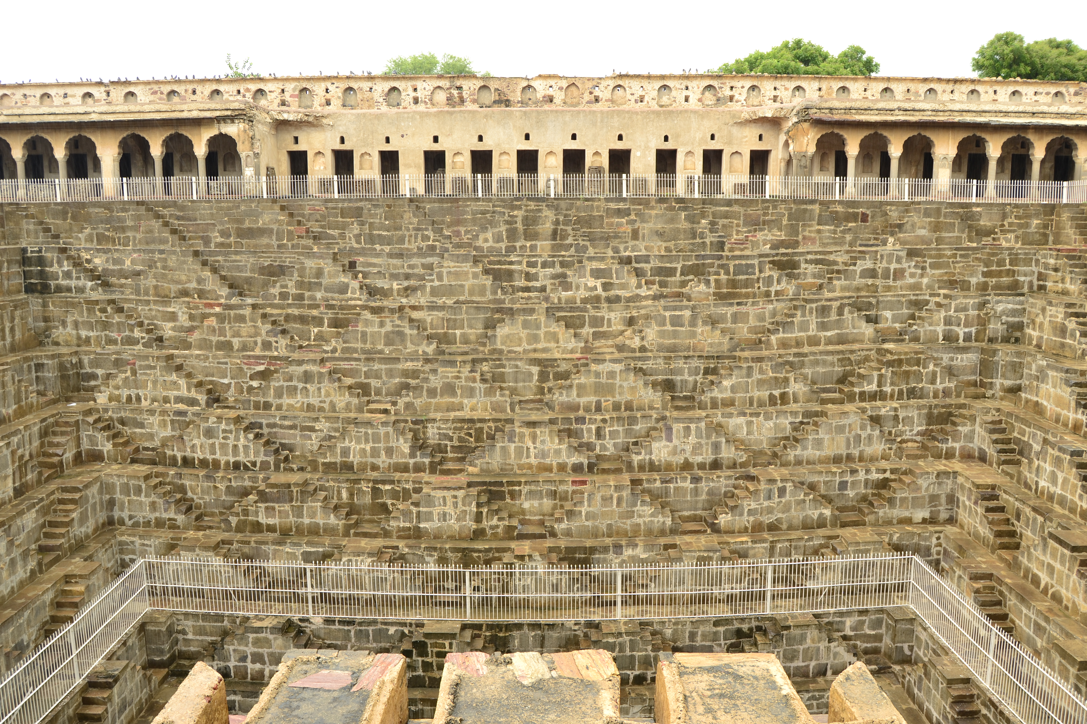 колодец Чанд Баори